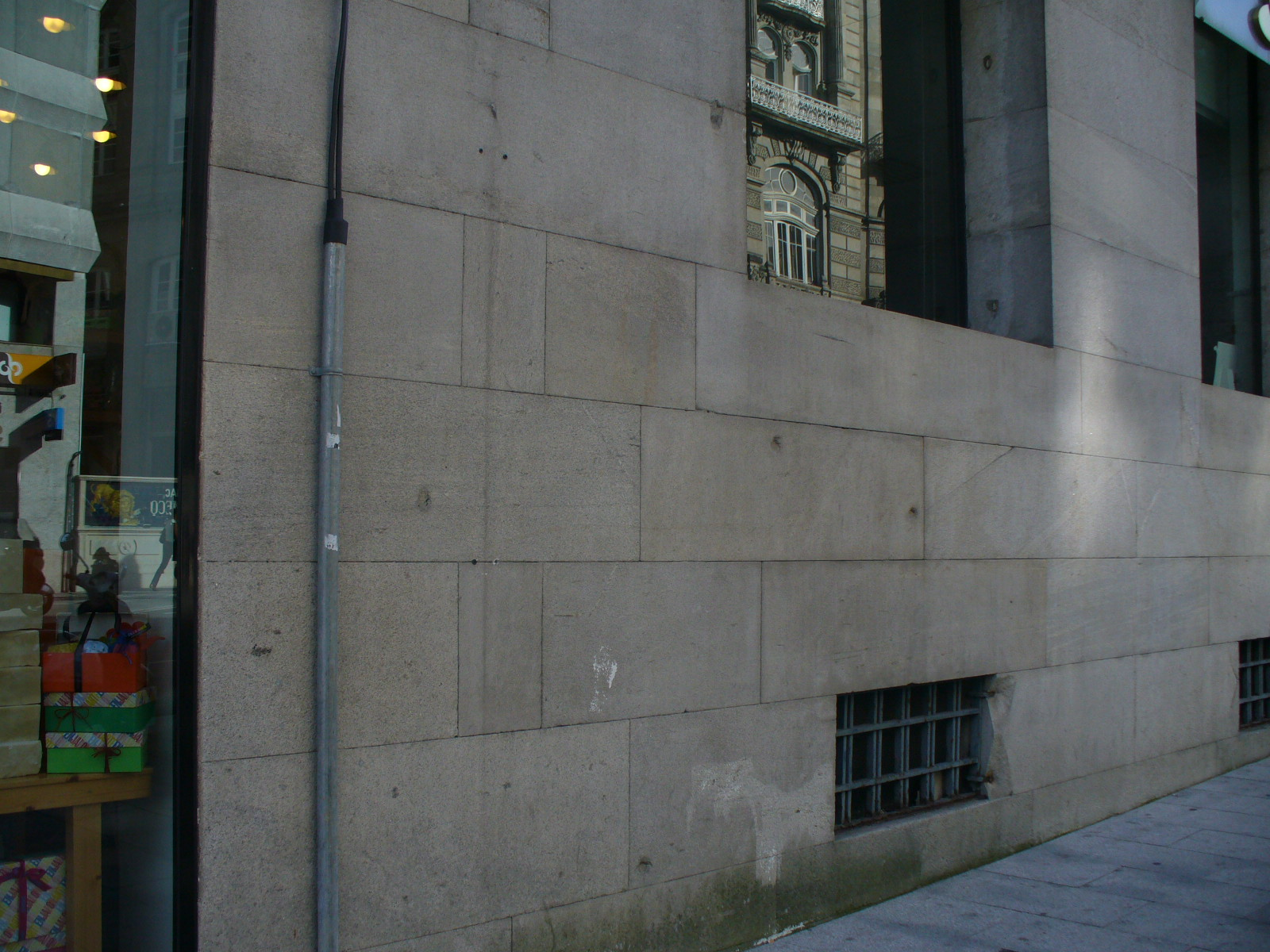 Pafospuroj en la Sunpordo (Porta do Sol), Vigo. Tumultoj de 1936.